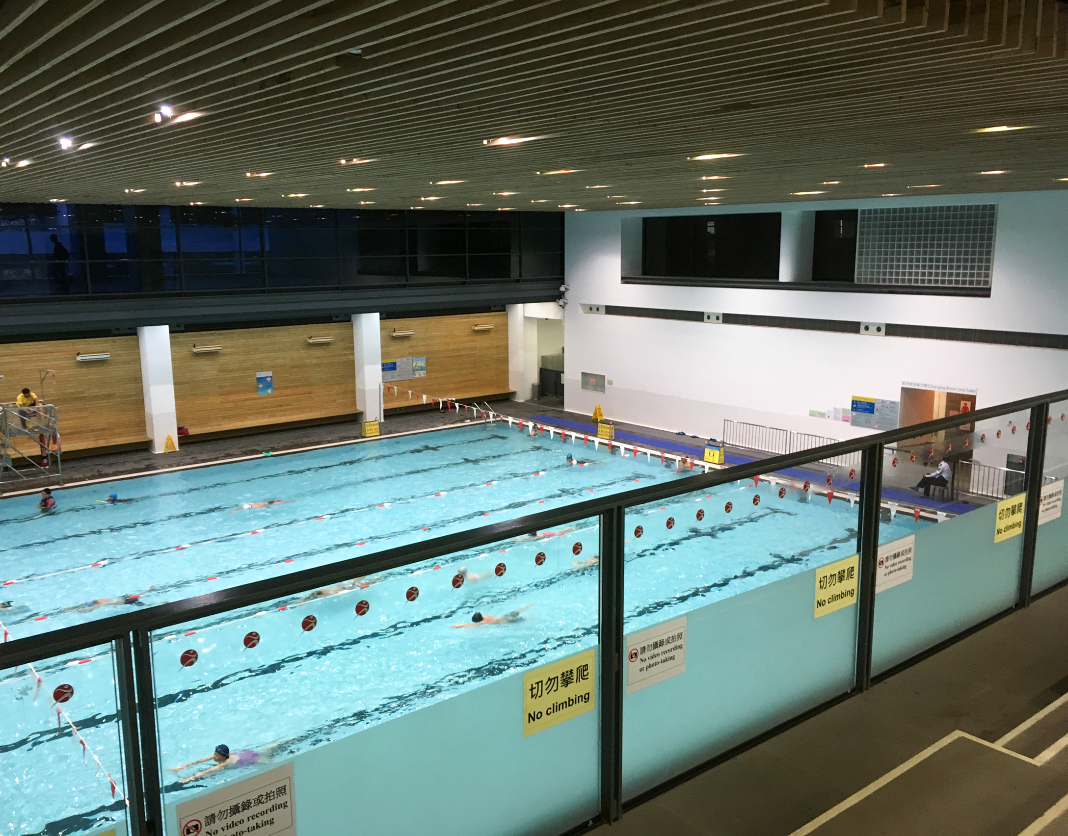 Ping Shan Tin Shui Wai Swimming Pool